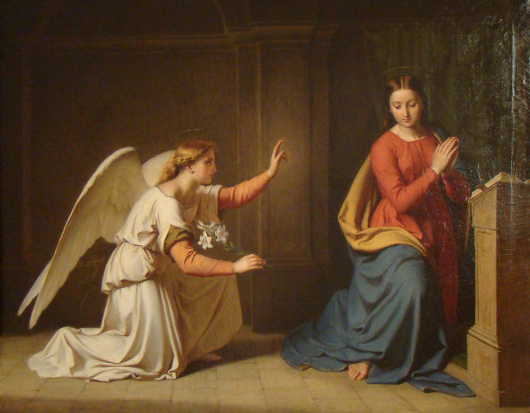 Mariä Verkündigung, Gemälde von Alfred Diethe von 1857 im Kulturhistorischen Museum der Stadt Rostock, seit 1897 in öffentlichem Besitz